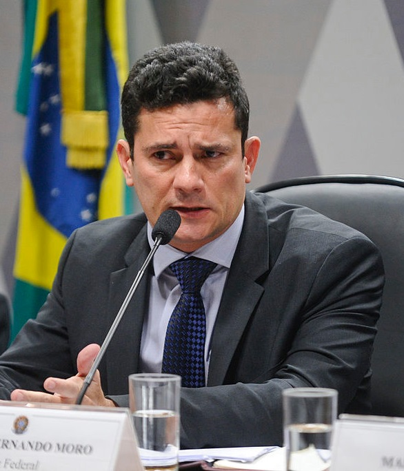 Comissão de Constituição, Justiça e Cidadania (CCJ) realiza audiência pública interativa para instruir o PLS 402/2015, que altera o Código de Processo Penal, em relação aos recursos. Em pronunciamento, juiz federal, Sérgio Fernando Moro. Foto: Marcos Oliveira/Agência Senado.